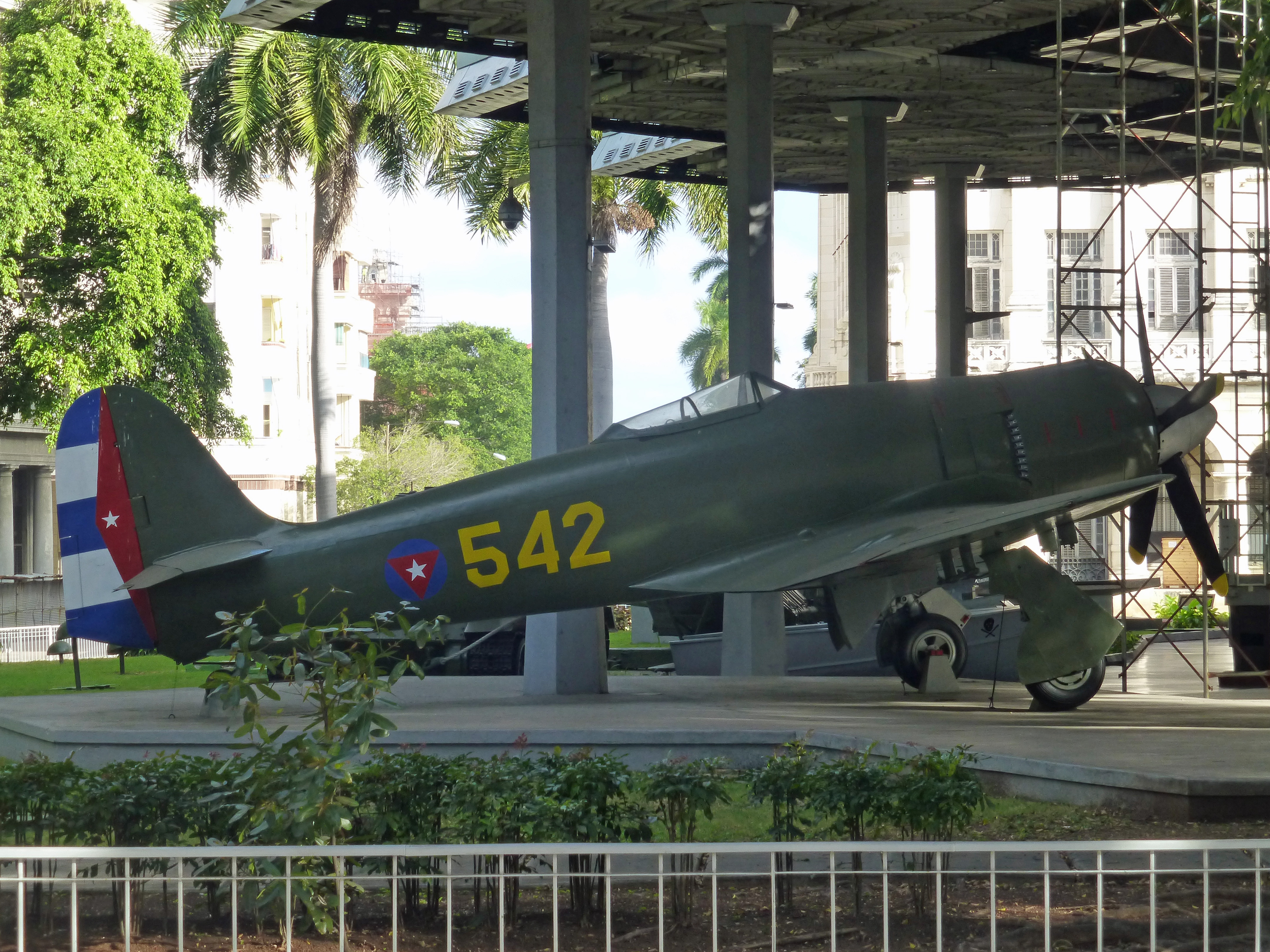 La Havane : Musée de la Révolution : Hawker Sea Fury